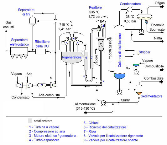 FCC - Process flow diagram semplificato del processo di cracking catalitico a letto fluidizzato.